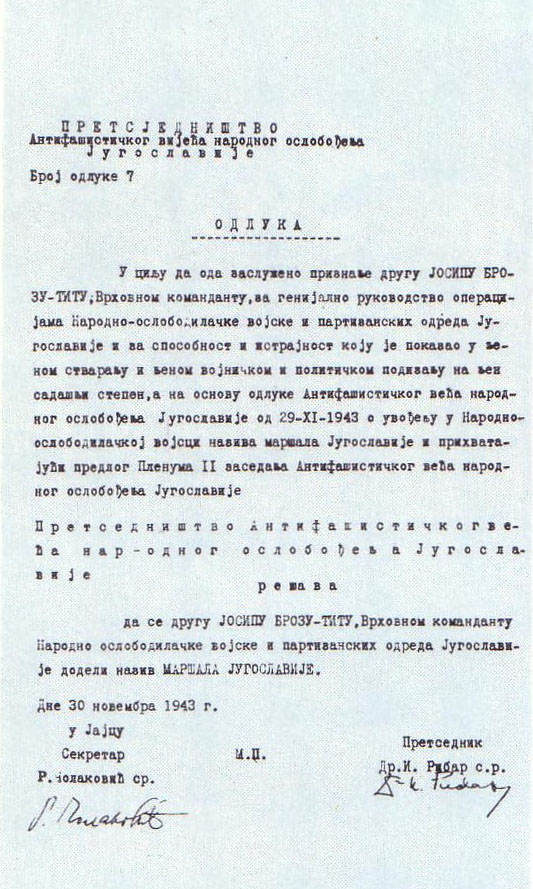 Odluka AVNOJ-a o dodjeli naziva maršala Jugoslavije Josipu Brozu Titu